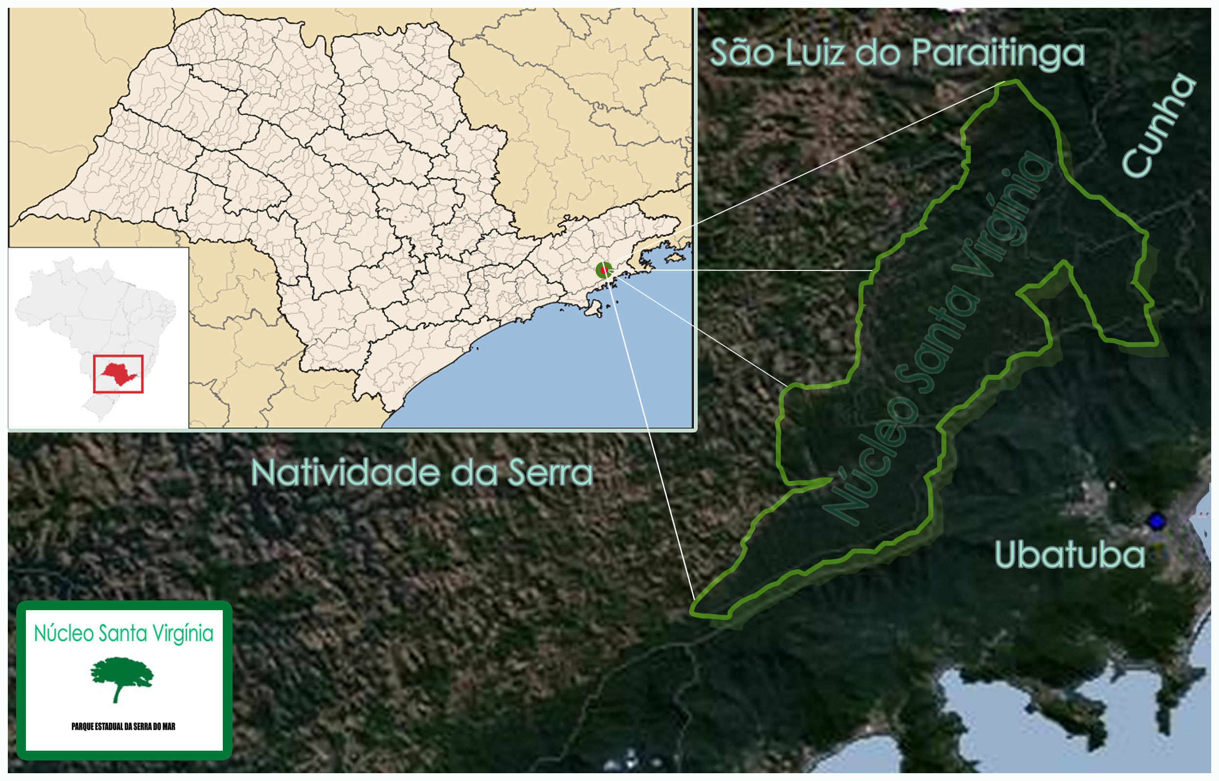 Mapa do Núcleo Santa Virgínia, Parque Estadual do Serra do Mar, São Paulo, Brasil